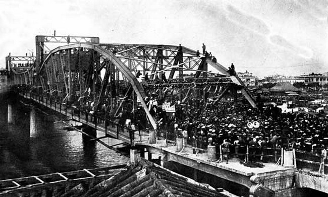 1933年2月15日廣州市海珠橋落成開通之日。